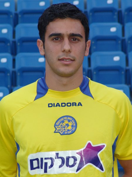 יוסי שבחון, שחקן מכבי תל אביב (Yossi Shevhon of Maccabi Tel Aviv)